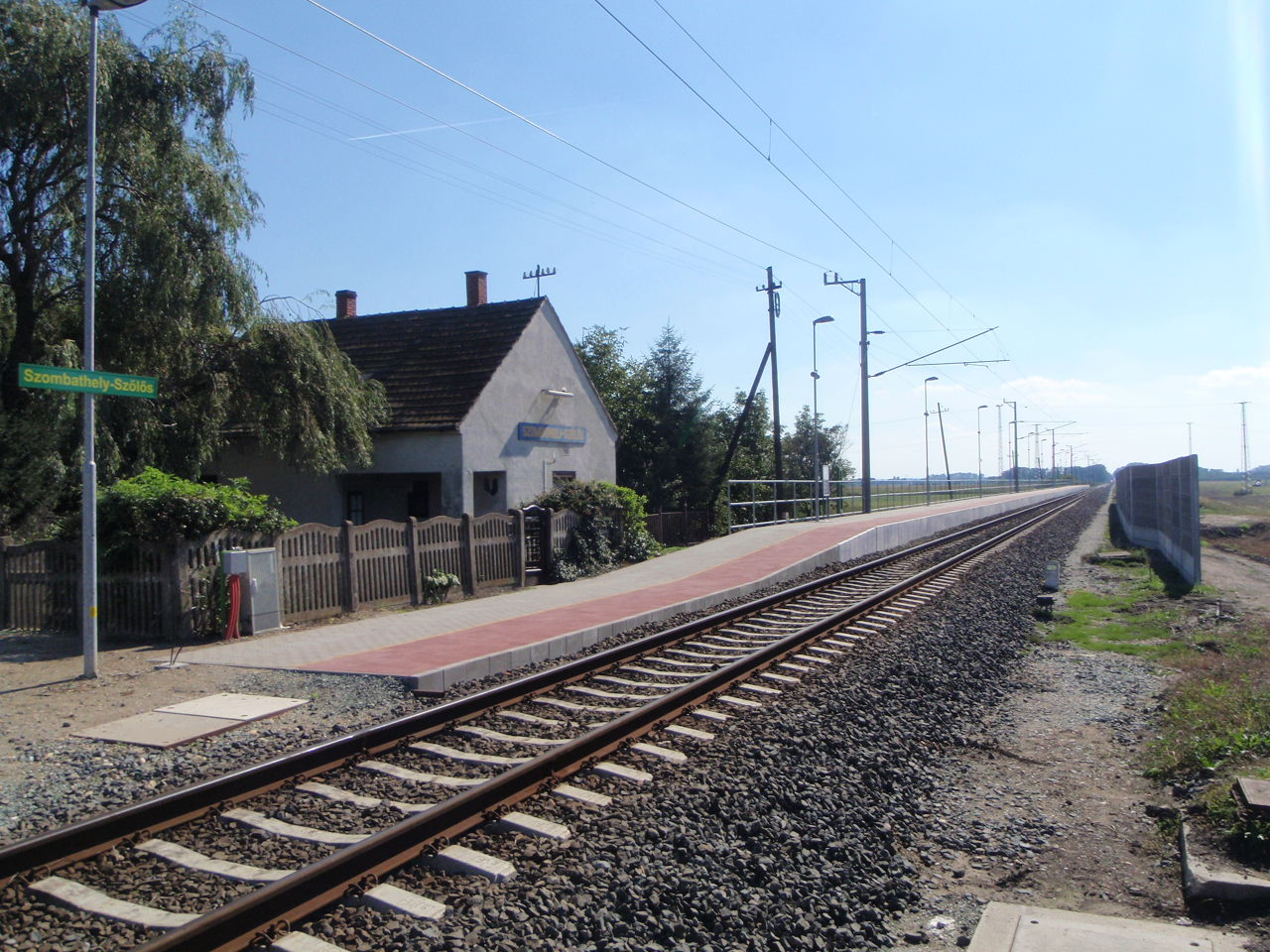 Haltestelle Szombathely-Szőllős In WestBahn Ungarn